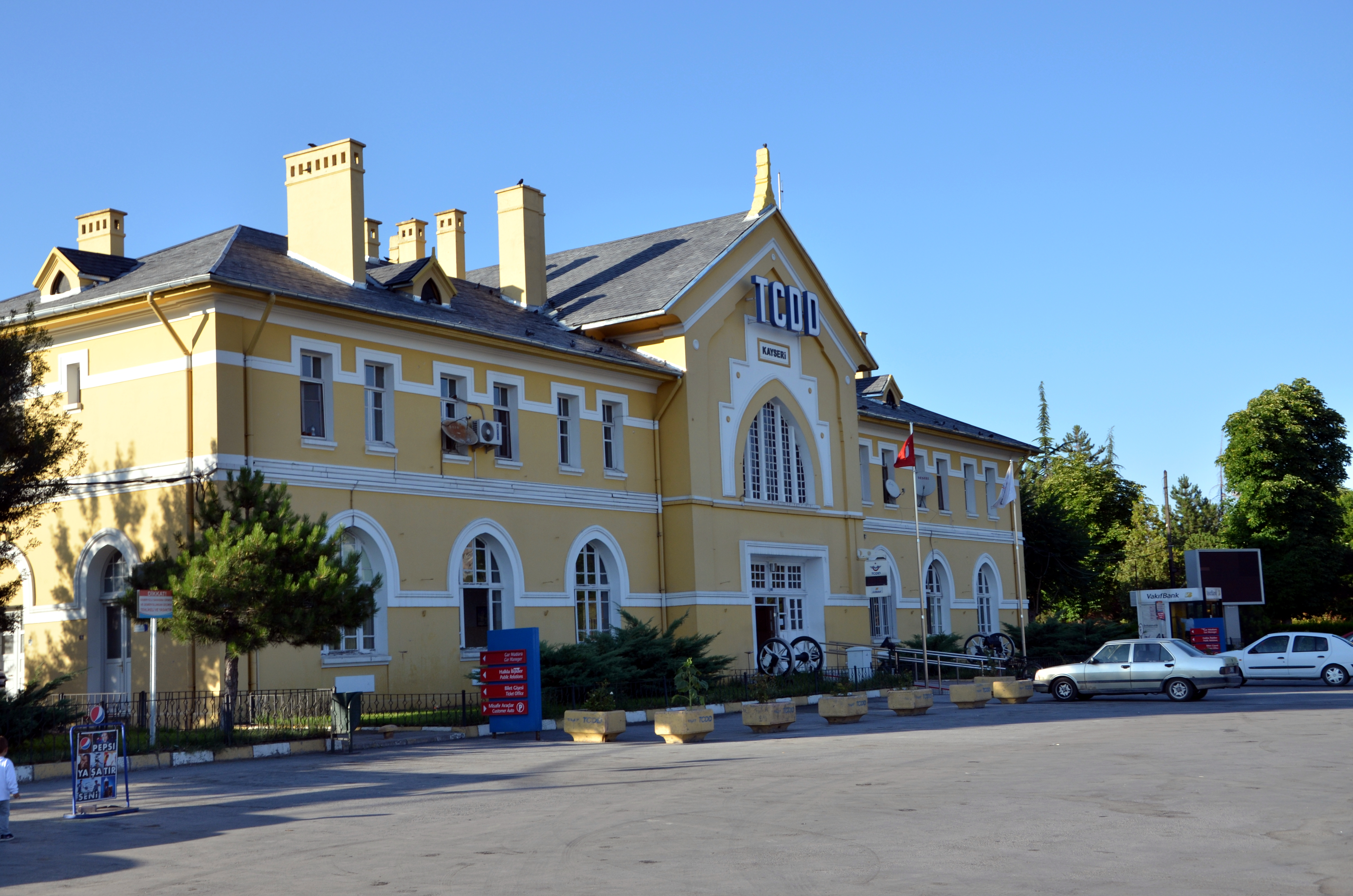 Kayseri tren garı